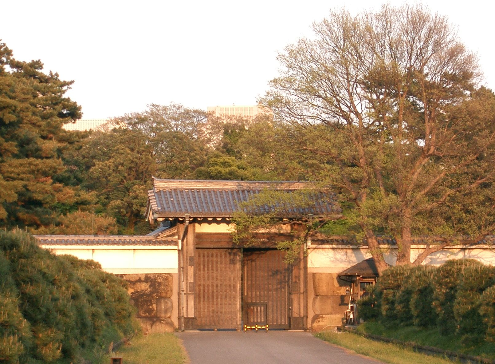 （皇居の）半蔵門